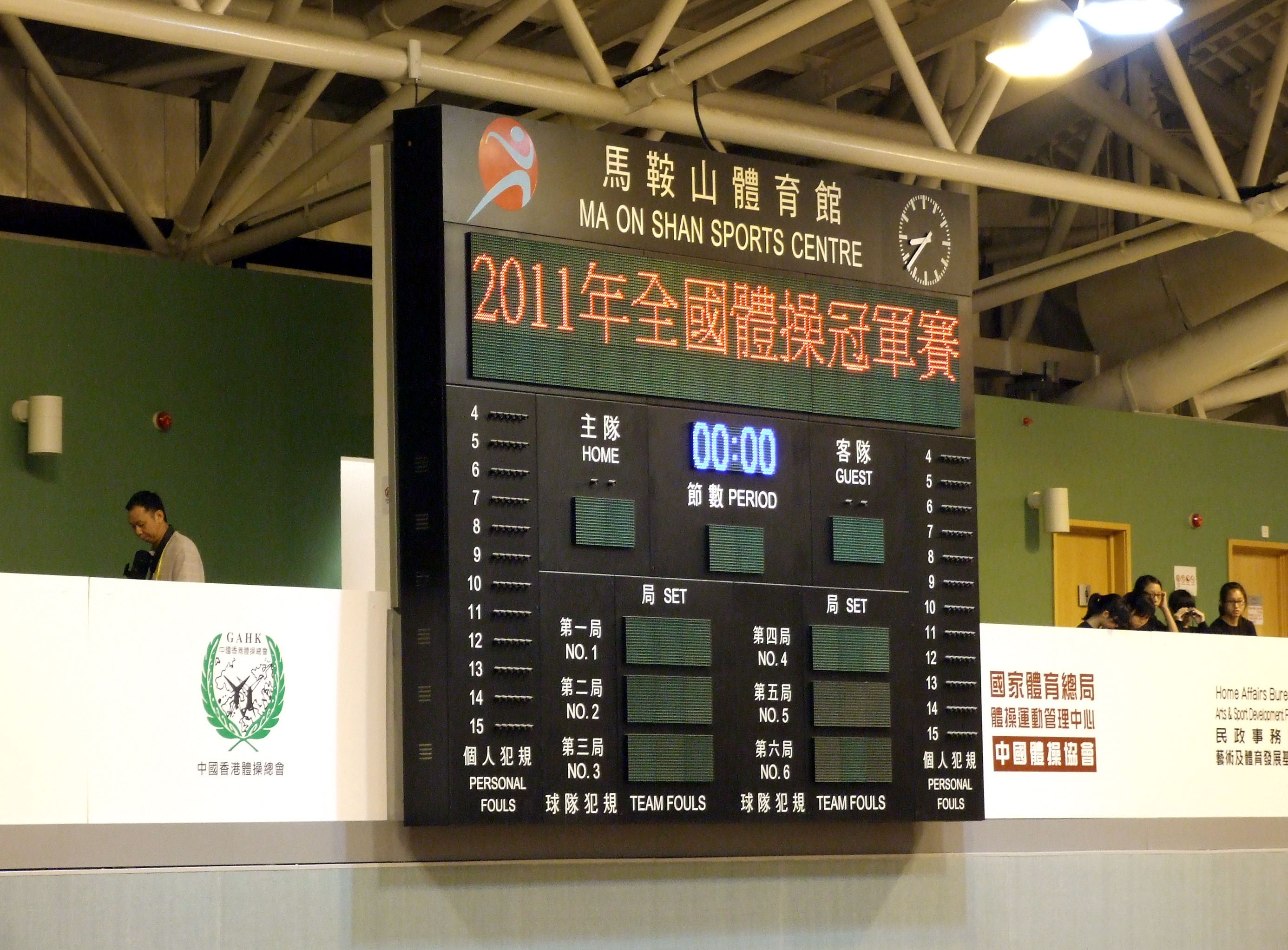 中文（香港）: 馬鞍山體育館內記分牌